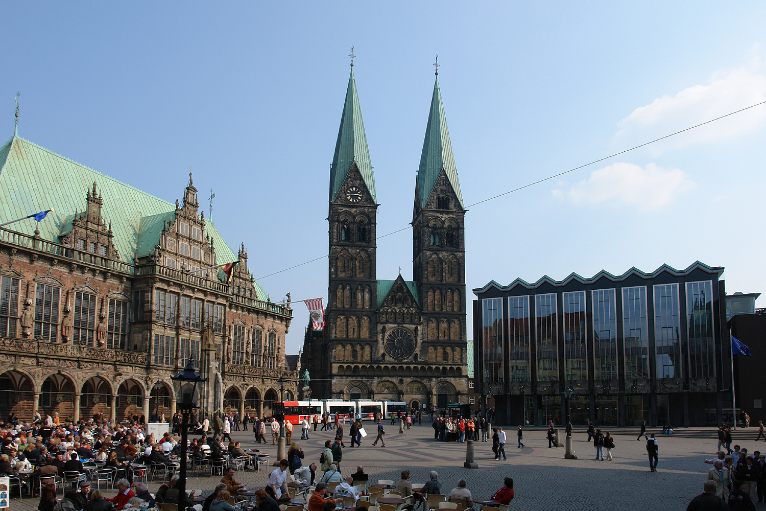 Bremer Rathaus, St. Petri Dom und Gebäude der Bremischen Bürgerschaft